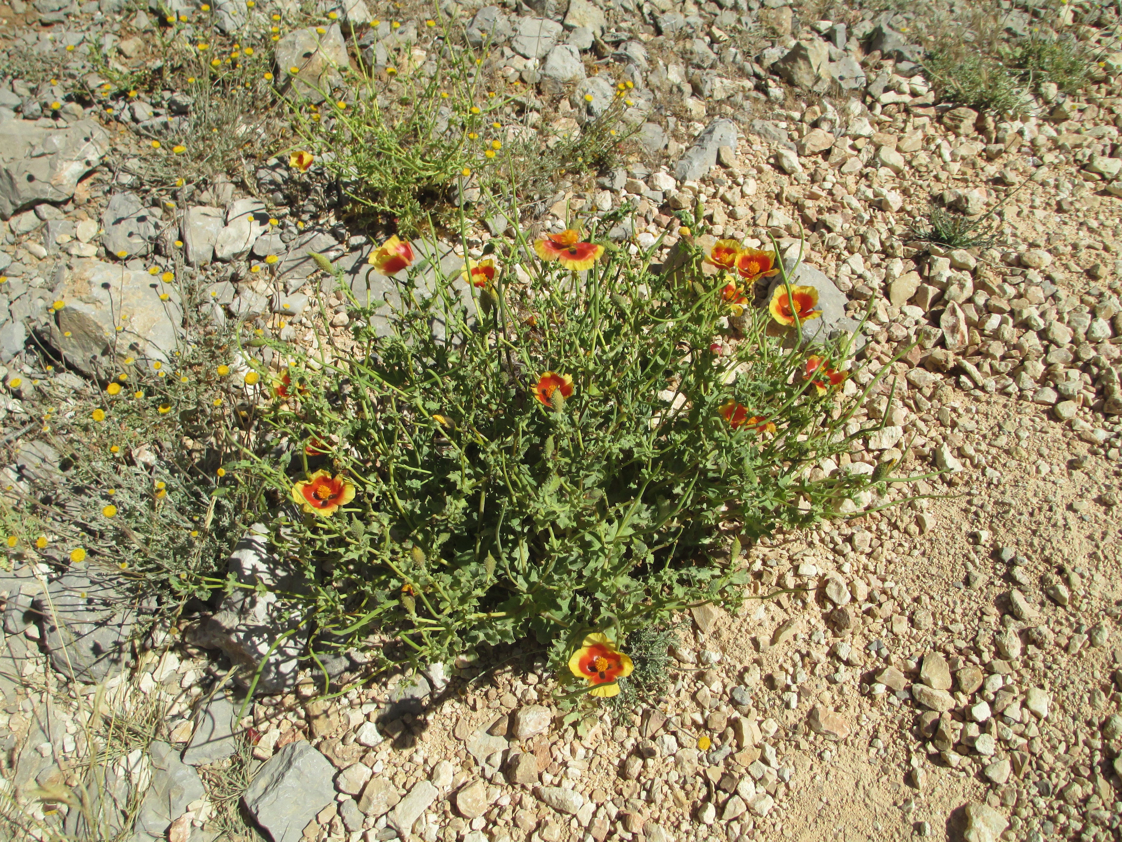 פרגה קרחת בגבעת הקרב בחרמון